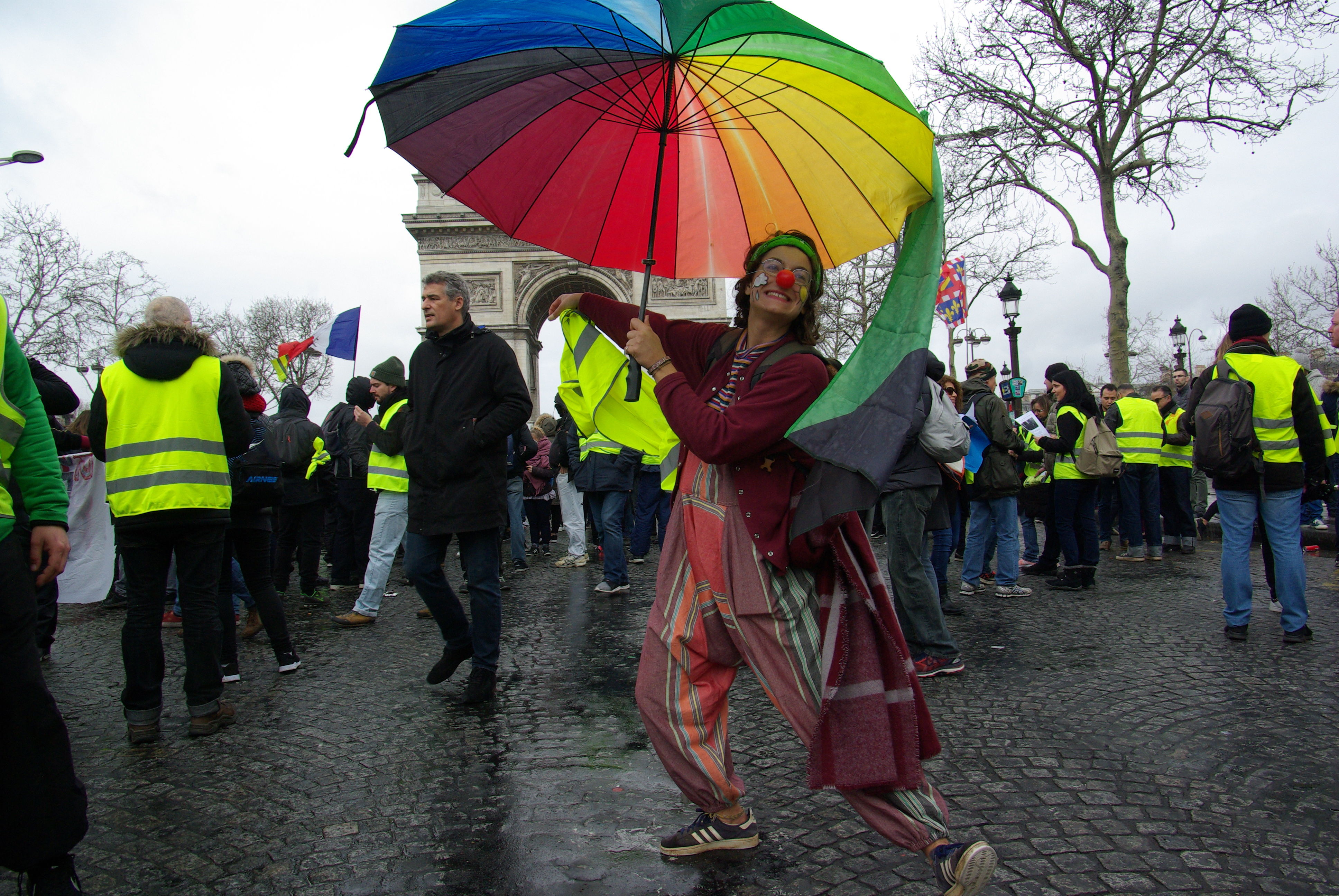 clownerie devant l'arc de triomphe pendant l'acte 17